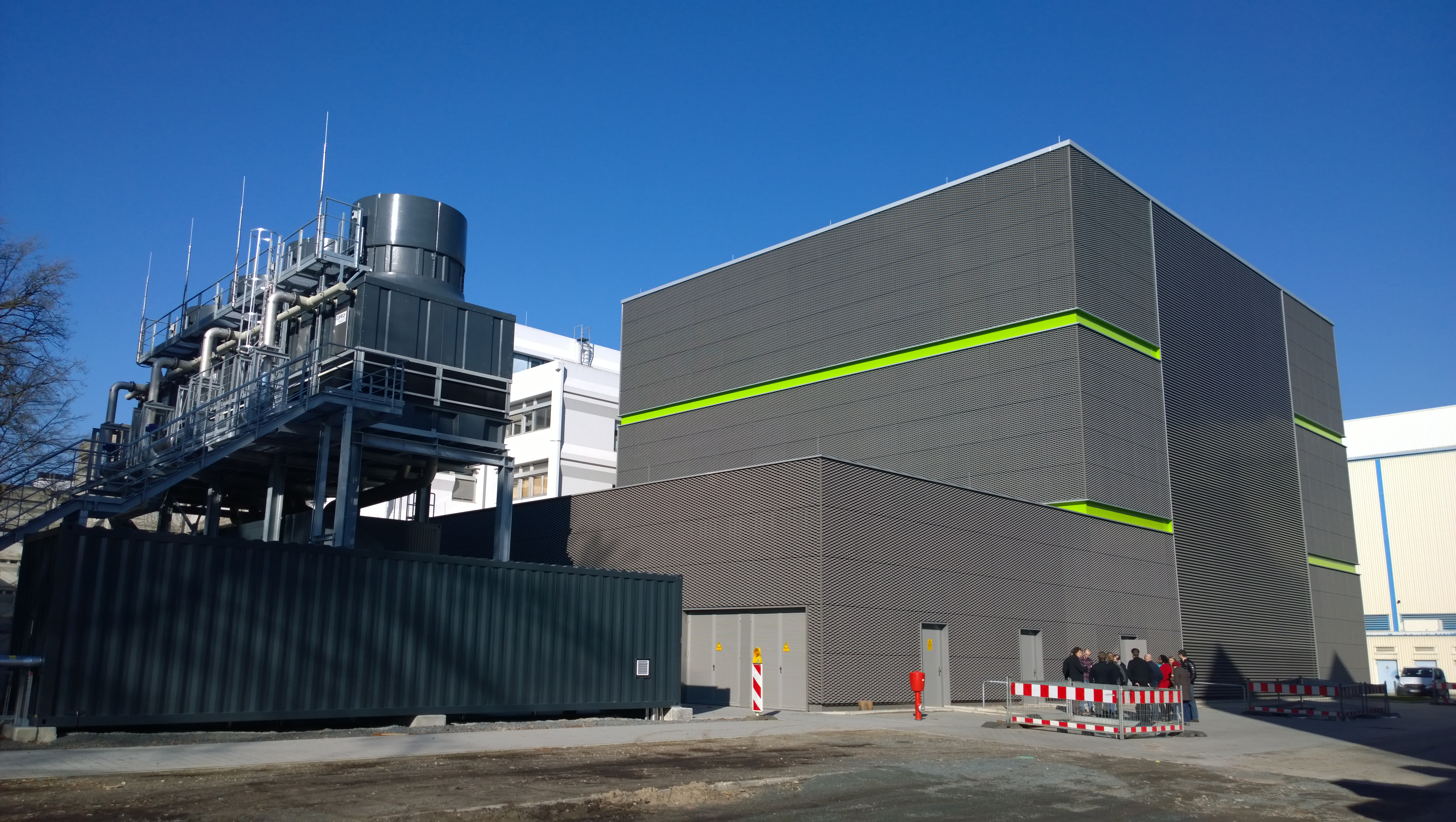 Neues Green IT Cube Rechenzentrum mit der Verdunsteranlage (Kühlung) an der GSI in Darmstadt - Außenansicht.